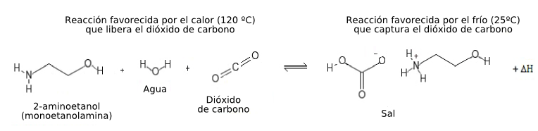 Illustration de la capture du CO2 avec le 2-aminoéthanol (monoéthanolamine)